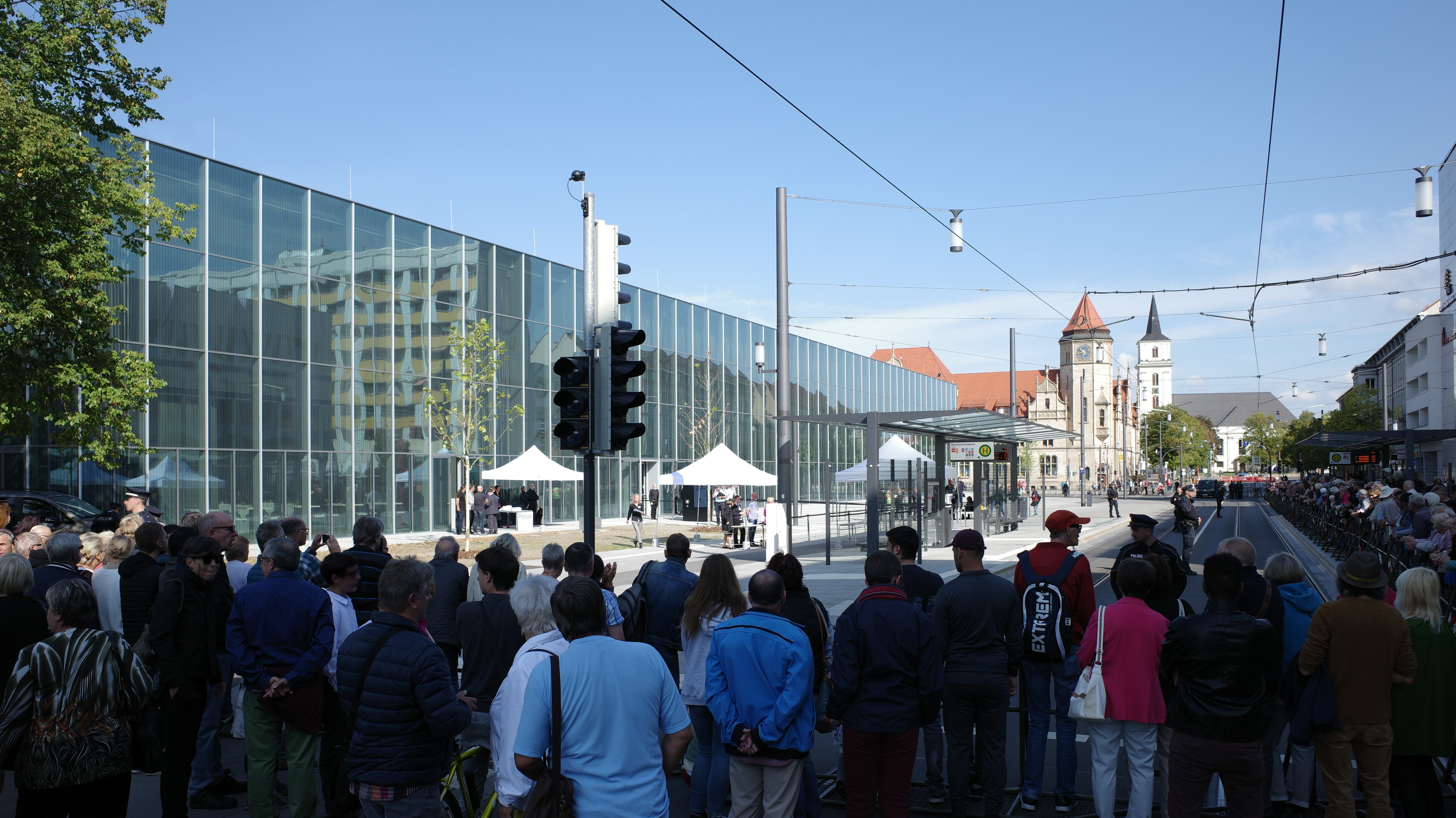 Dessau, Eröffnung des Bauhaus Museum am 08.09.2019